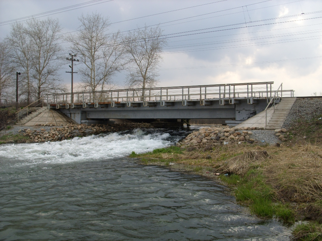 Мост через реку Ижору севернее станции Пудость